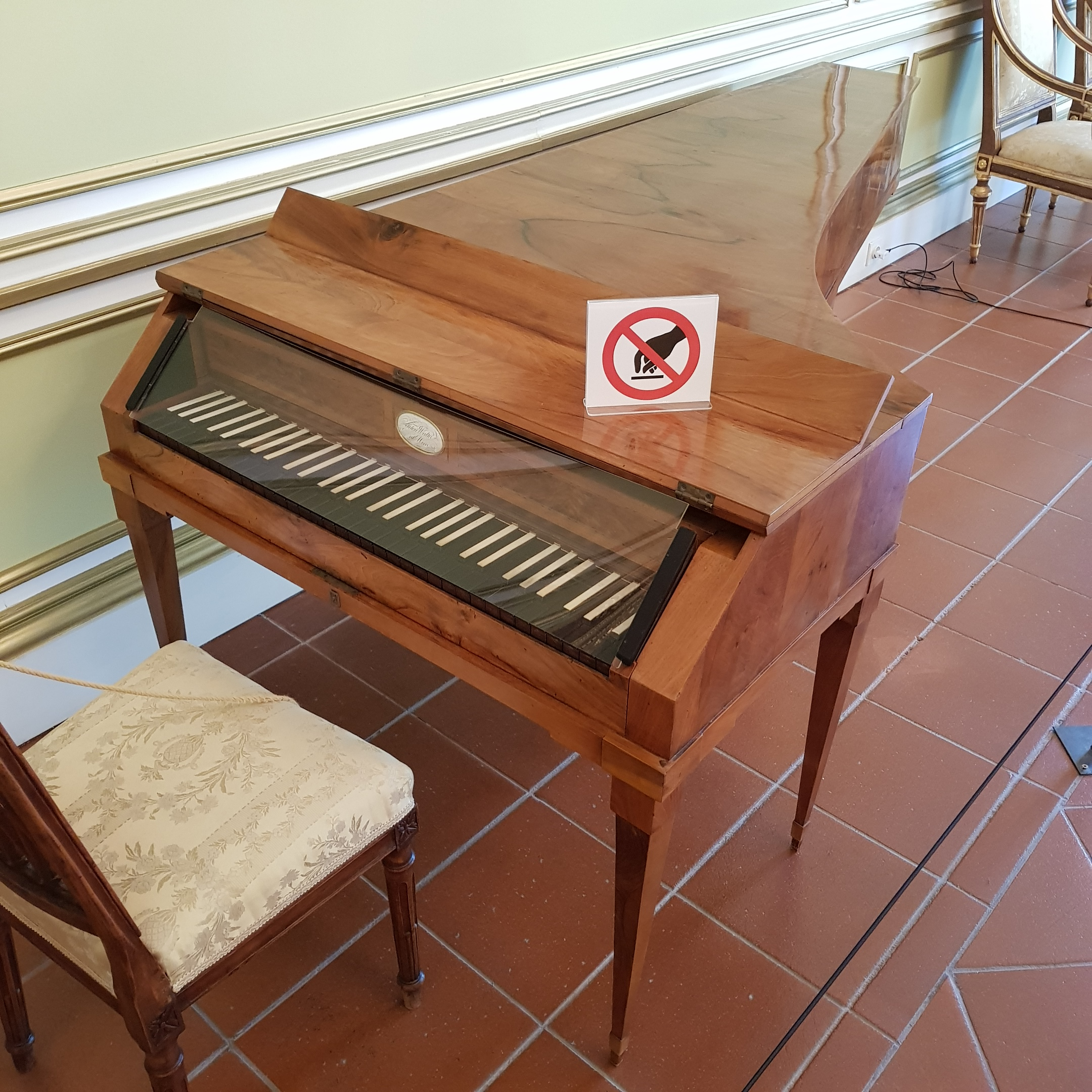 Pianoforte d'Anton Walter (Vienne, vers 1790) - Palais du Recteur à Dubrovnik